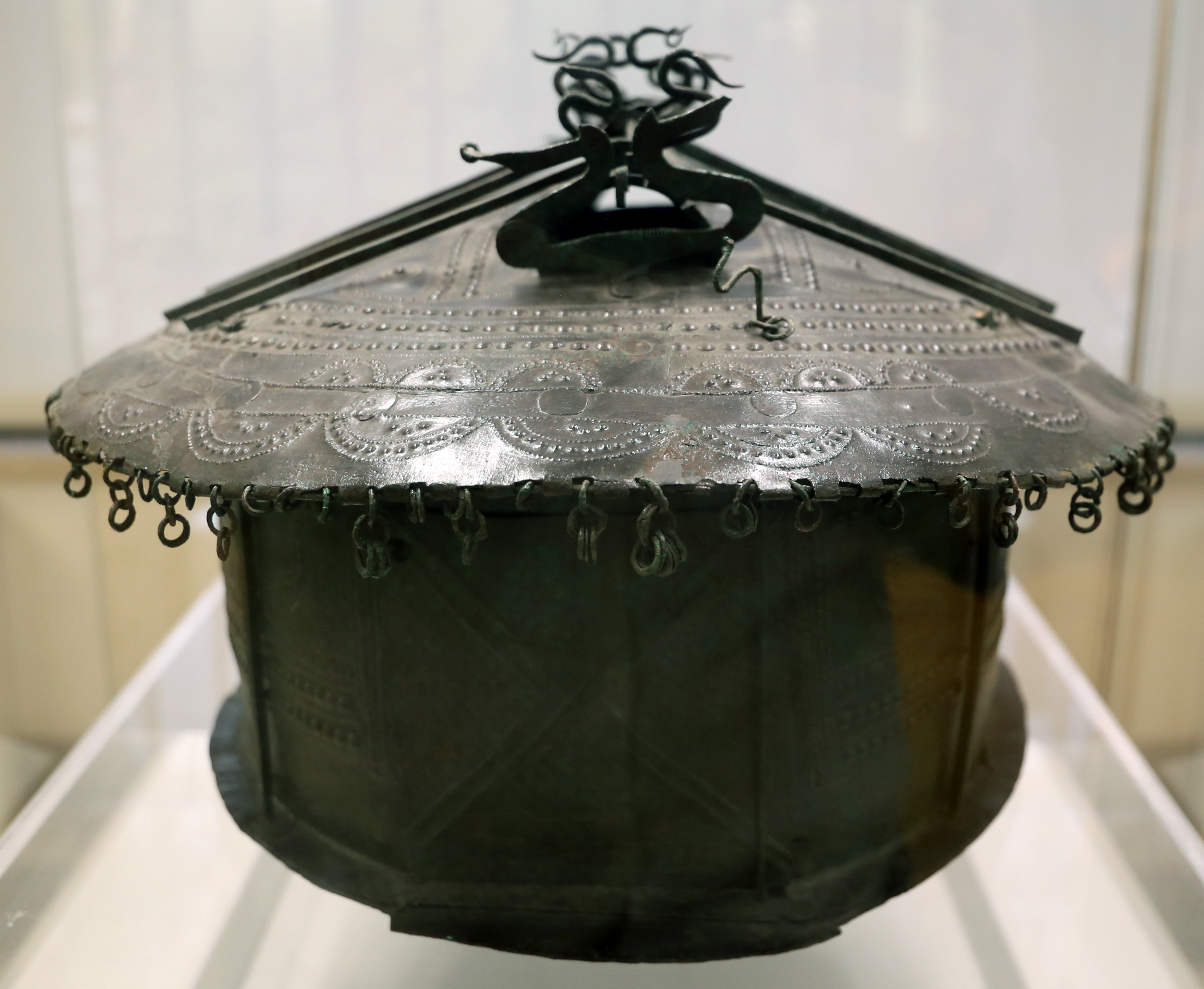 Museo nazionale etrusco di Villa Giulia This is a photo of a monument which is part of cultural heritage of Italy.